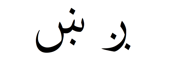 Die paschtunischen Buchstaben Ge und Xin, die Aussprache ist extrem dialektabängig